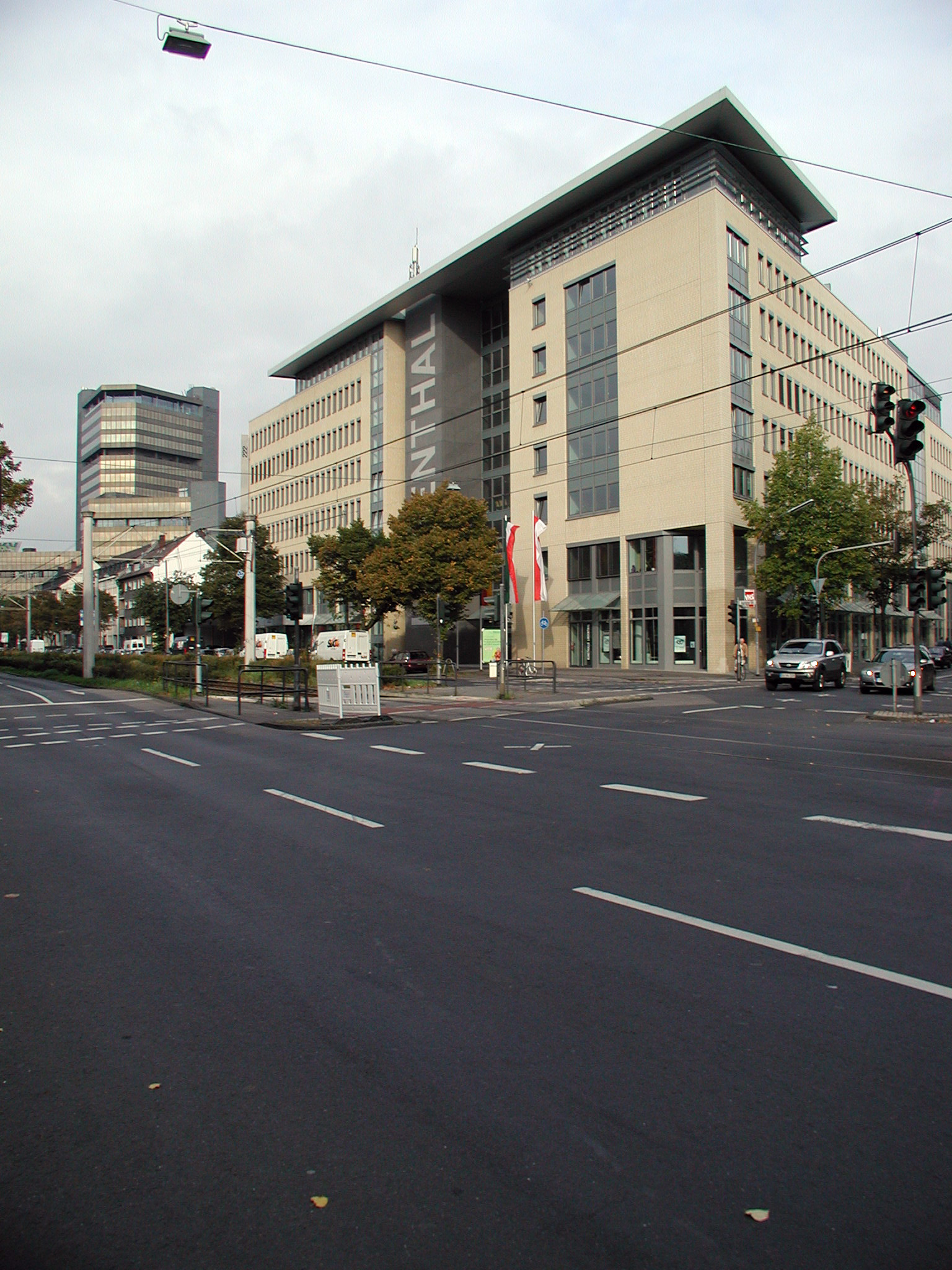 Köln Lindenthal, Lindenthal Bezirksrathaus